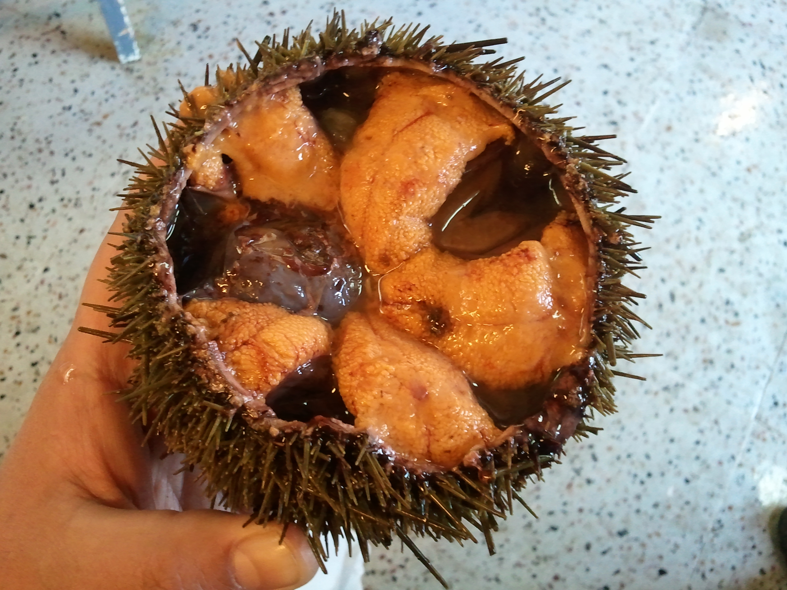 Erizos frescos, Puerto de San Antonio, Chile